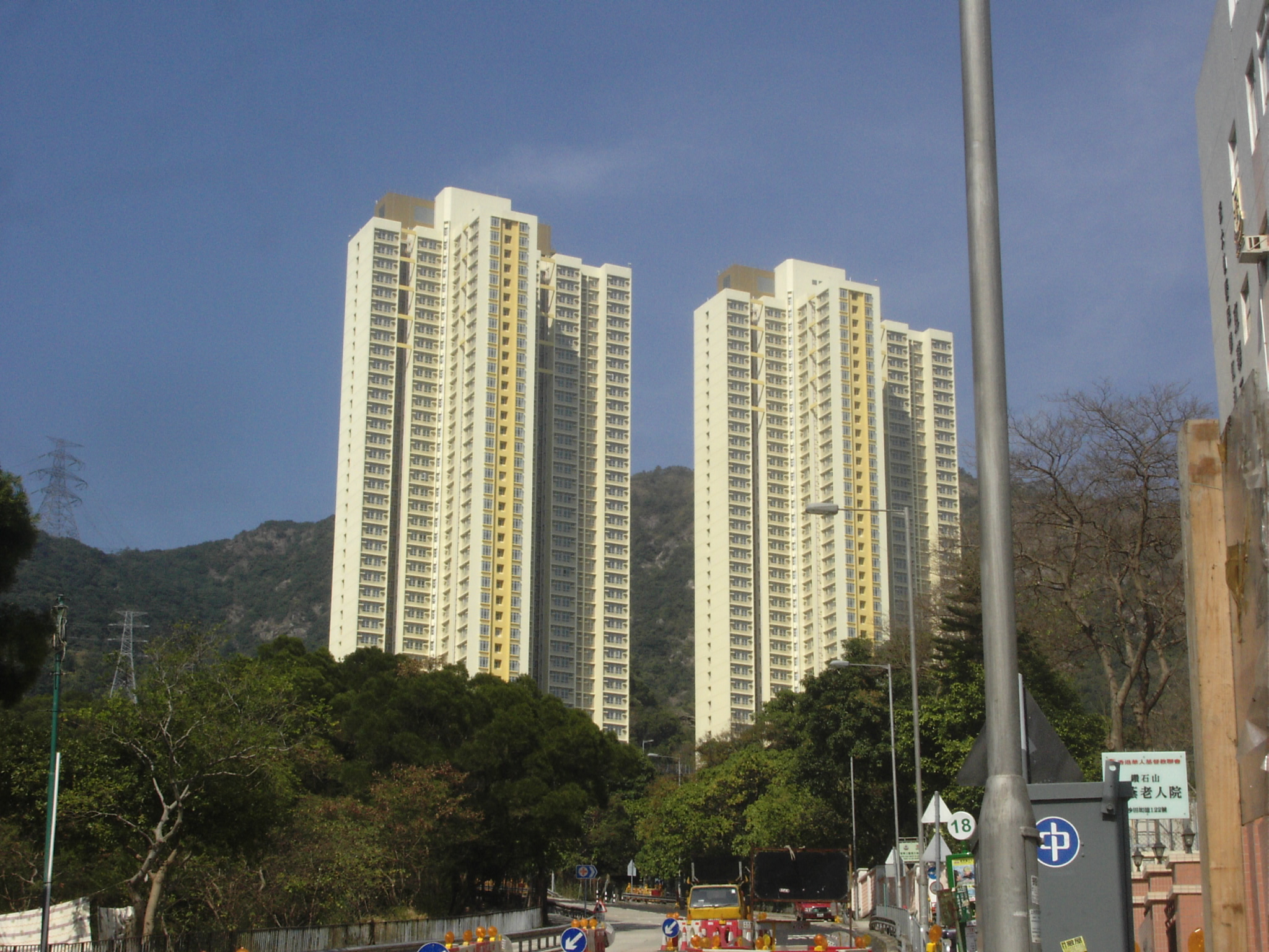 將近落成沙田坳邨(2011年1月)